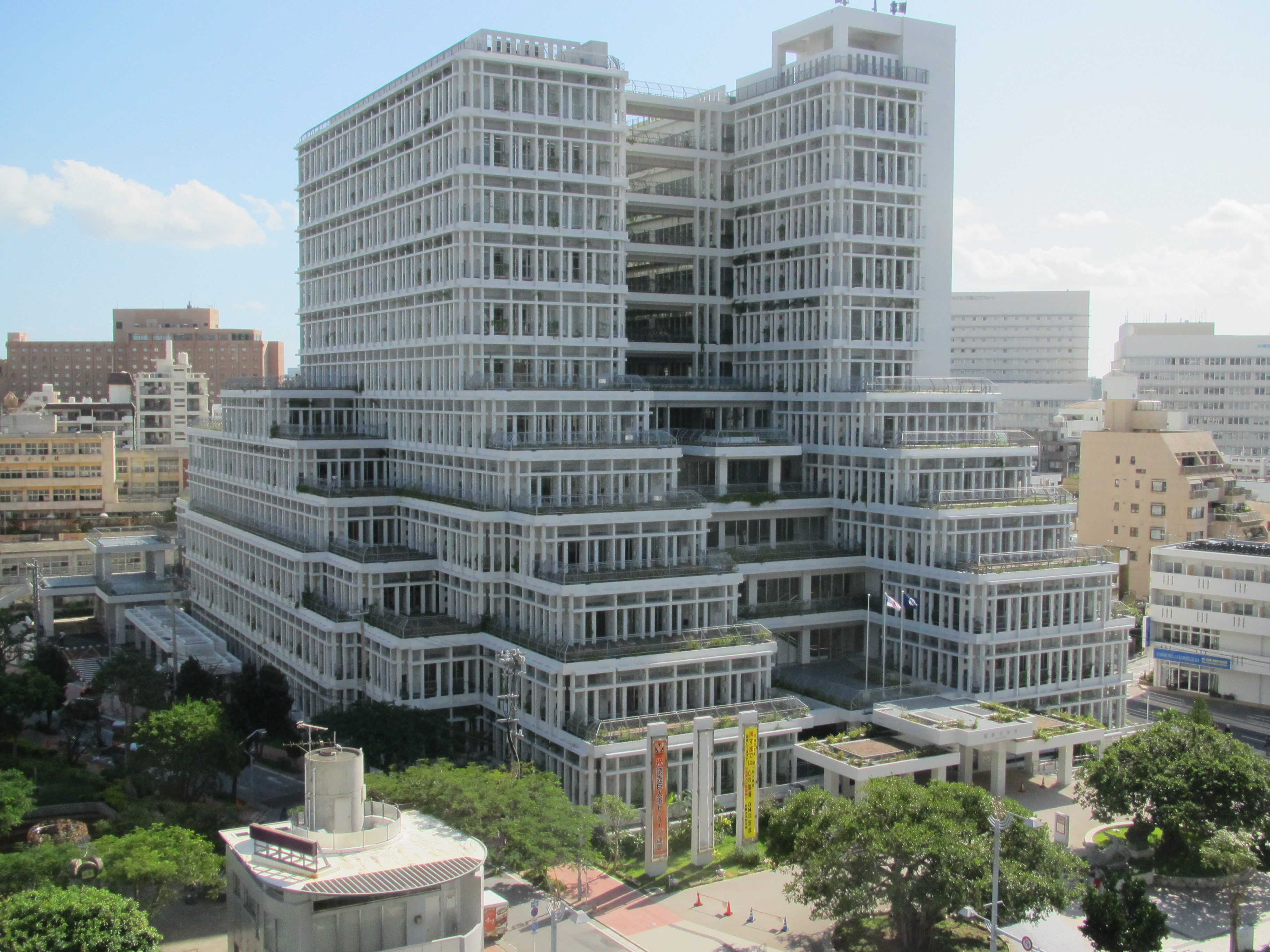 新那覇市役所庁舎。